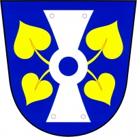 Znak obce Lipová